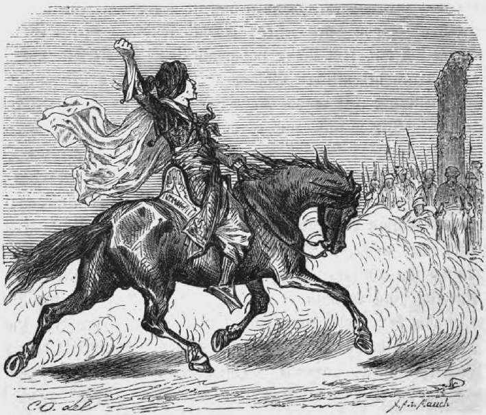 Szene aus Das Märchen vom falschen Prinzen: Der betrogene Prinz Omar eilt zur Säule El-Serujah